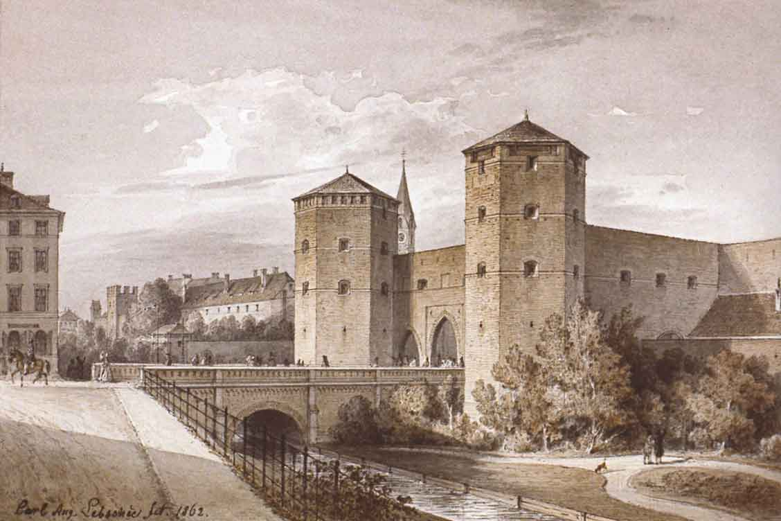 Das Sendlinger Tor nach der Restaurierung